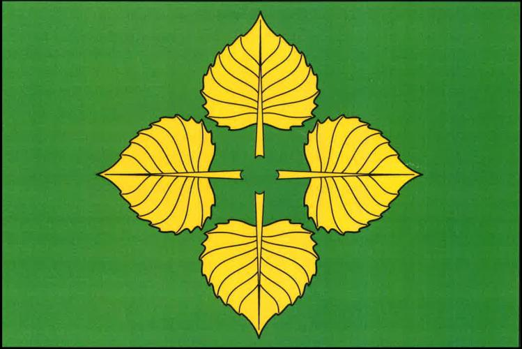 vlajka Knyk